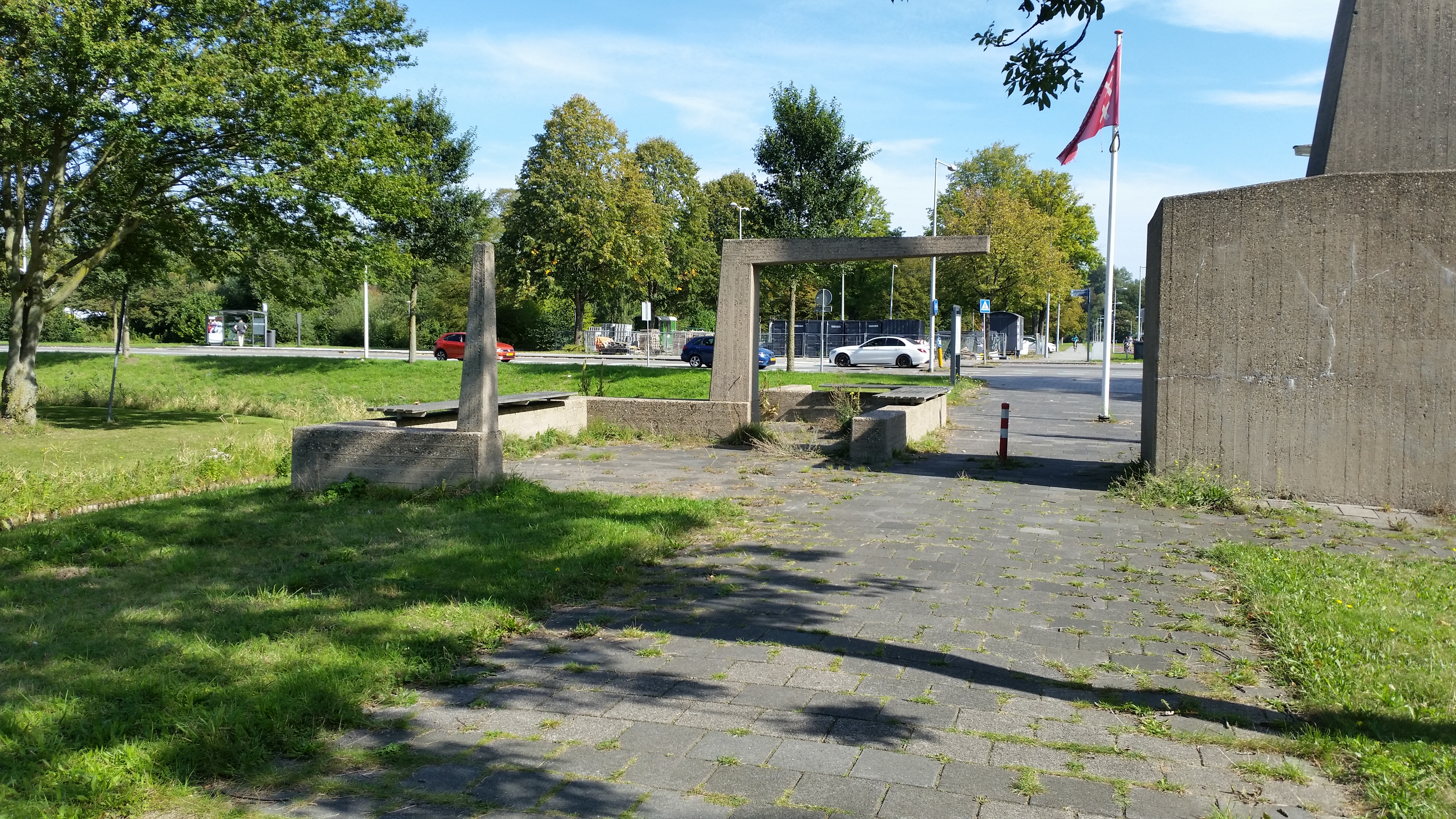 Detail van Poort van Constant